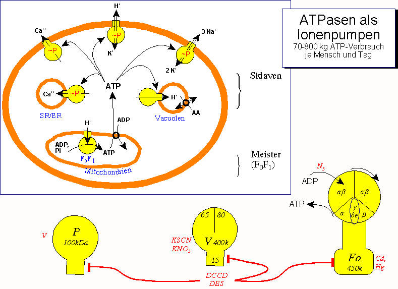 Korrigierte und erweiterte Version, zum Artikel "ATPasen" selbst angefertigt Juergen Bode 10:49, 12. Jul 2004 (CEST)